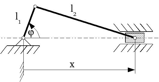 Schubkurbelgetriebe